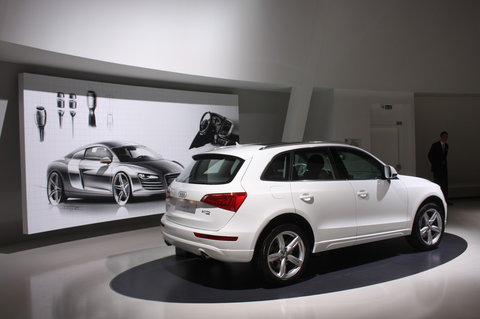 Audi Q5 in der Autostadt Wolfsburg